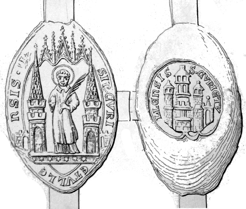 présenté lors de l'exposition.